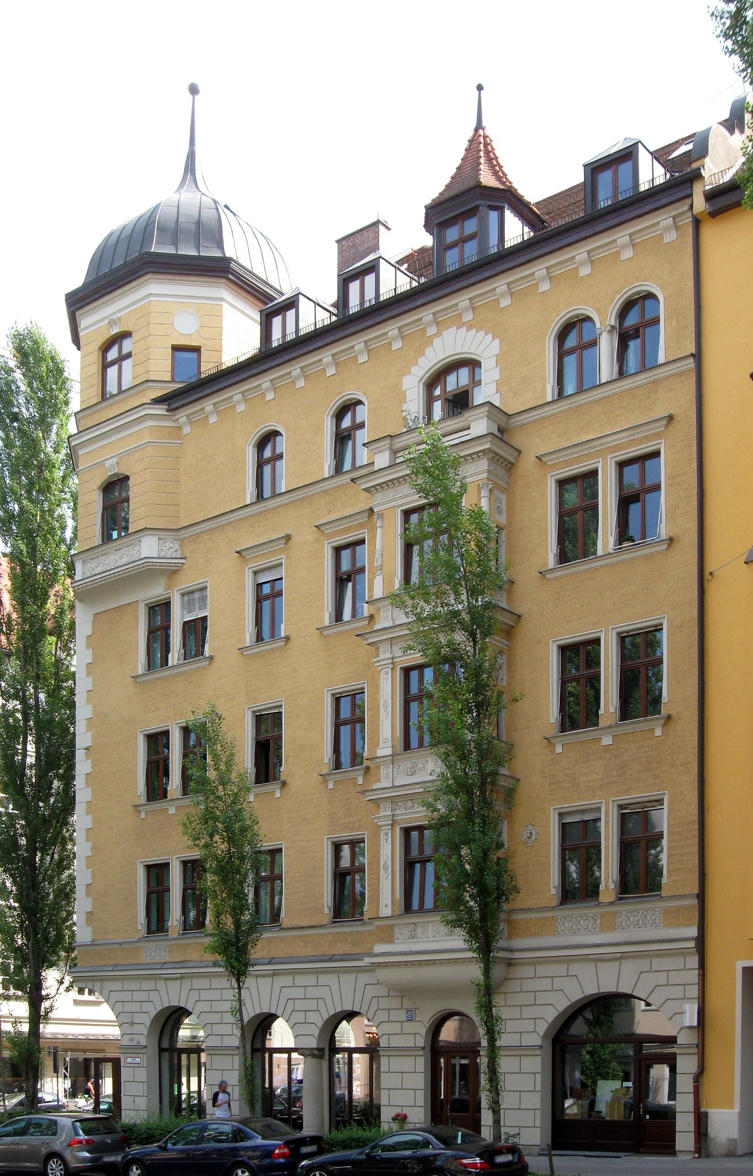 Lindwurmstraße 205; Mietshaus, stattlicher Eckbau in deutscher Renaissance, 1897–99 von R. Barbist